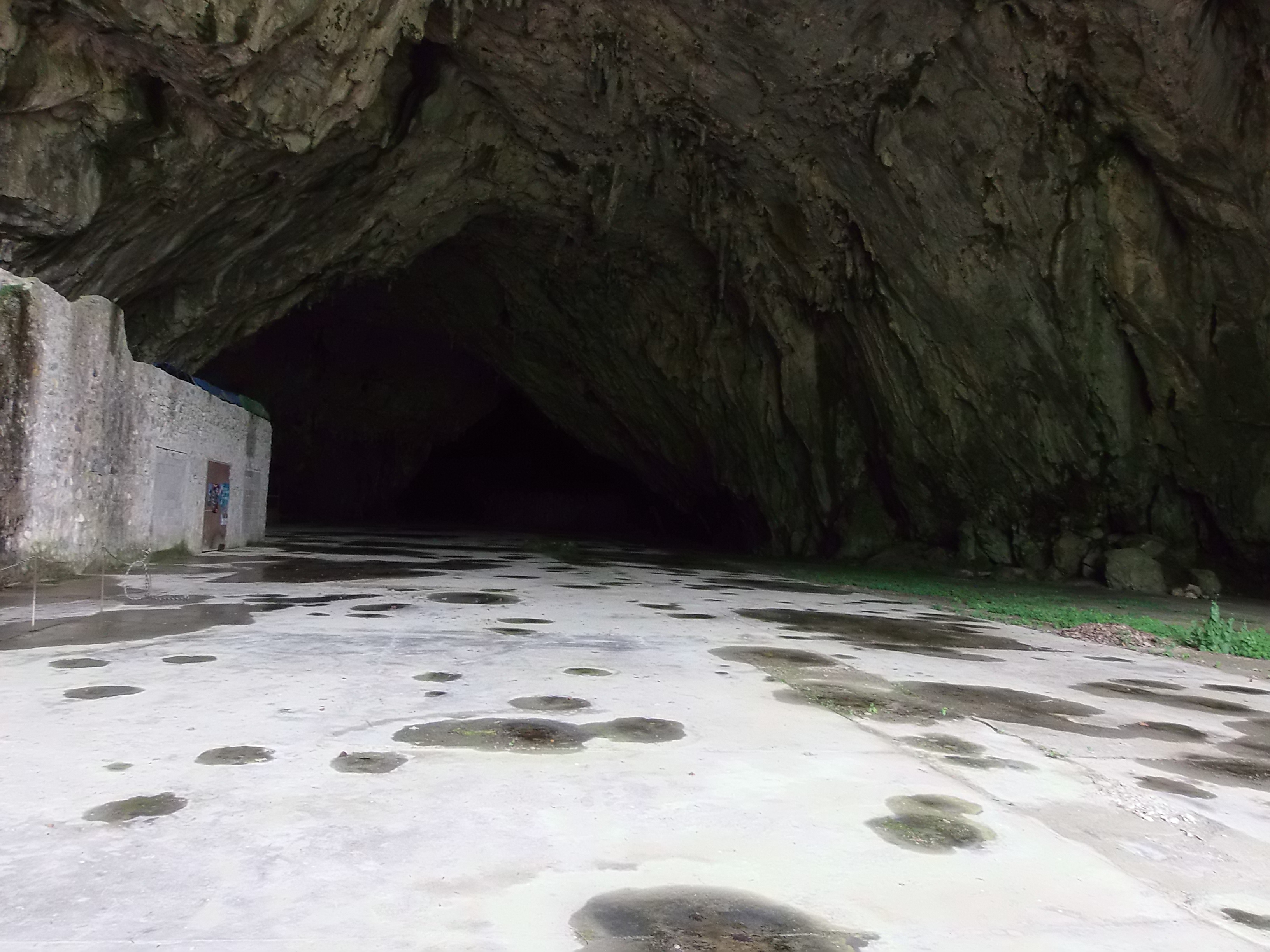 Entrée de la grotte de Bédeilhac, sur la commune de Bédeilhac-et-Aynat, en Ariège (France). Vaste grotte préhistorique, dont on voit ici l'entrée, objet d'un exploit en 1972 où un petit avion de tourisme y a atterri.